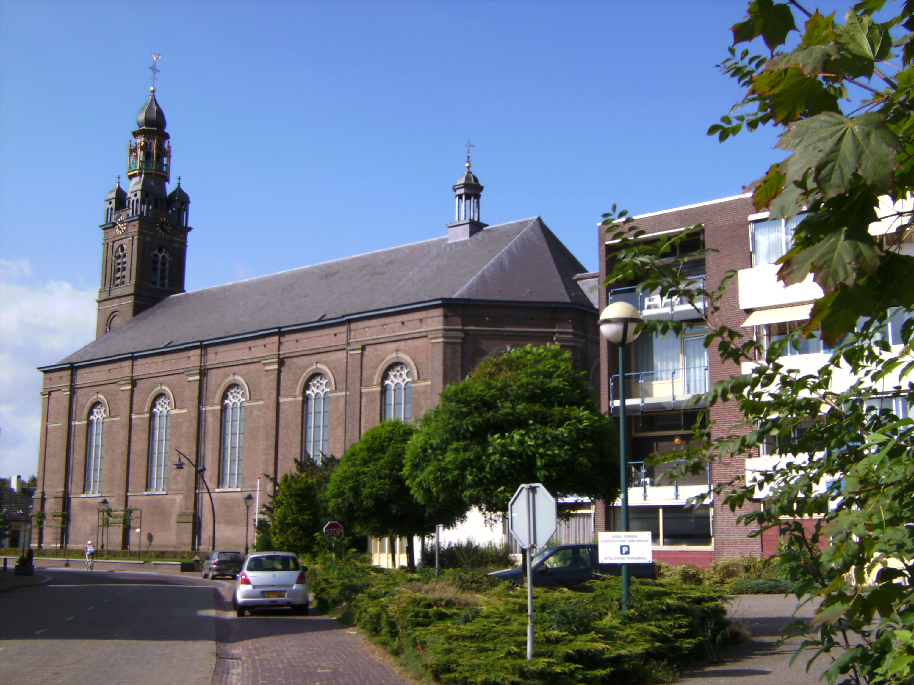 Erp, kerk